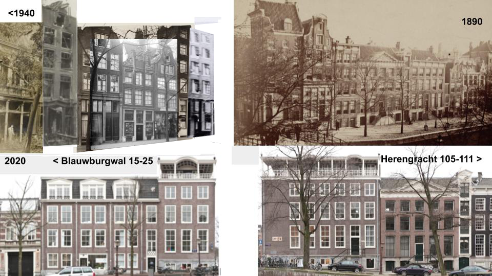 Een reconstructie van hoe de Blauwburgwal eruit zag voorafgaand aan het bombardement op basis van beeldmateriaal afkomstig uit de Collectie Stadsarchief Amsterdam.